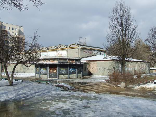 Dawne kino WZ, potem klub Fugazi, stan na pocz. 2006